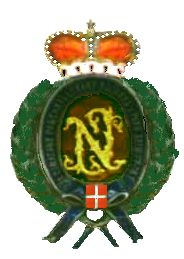 Medaille voor de Servisch-Bulgaarse oorlog van 1886